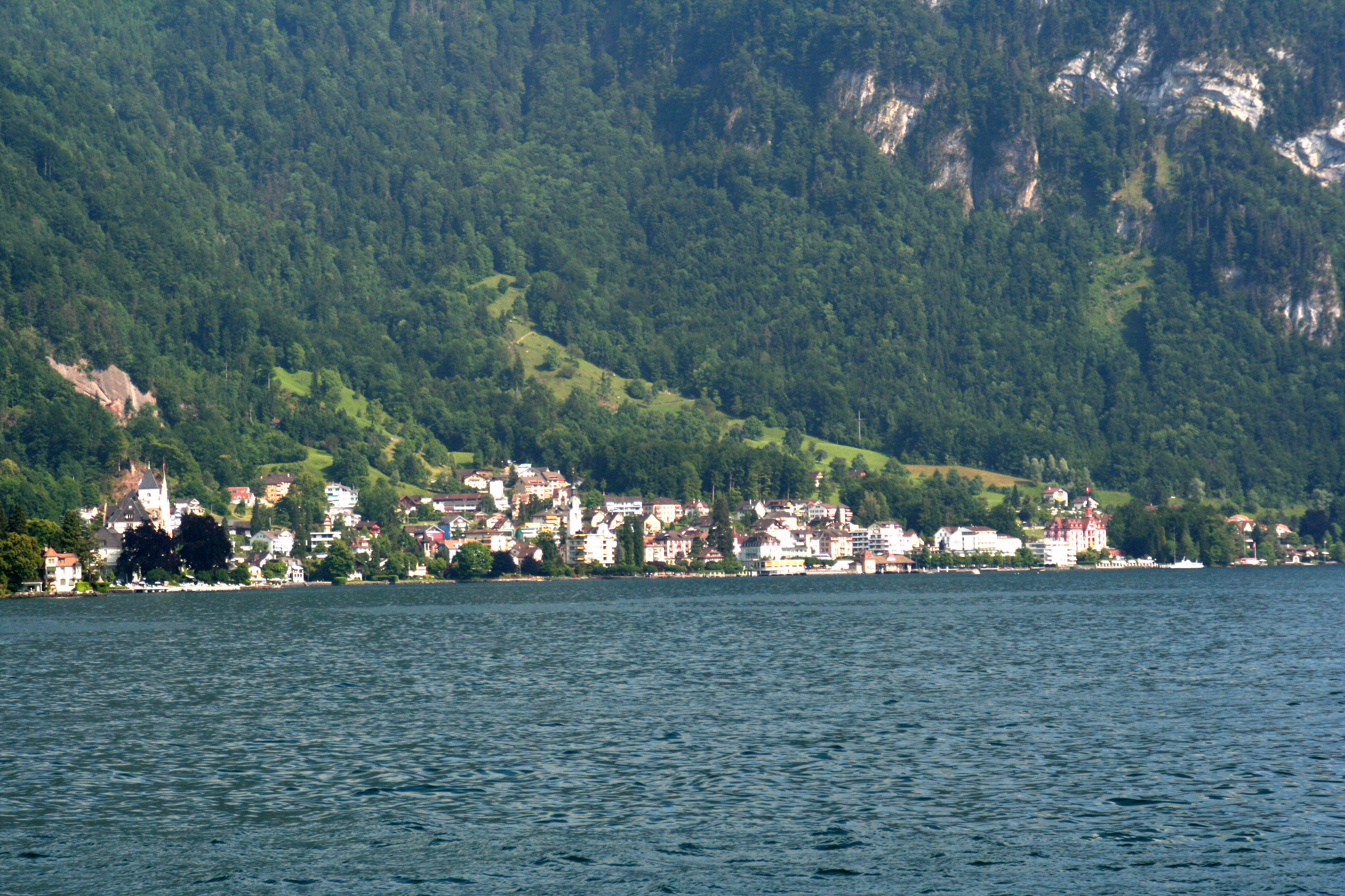 Vitznau, Schweiz